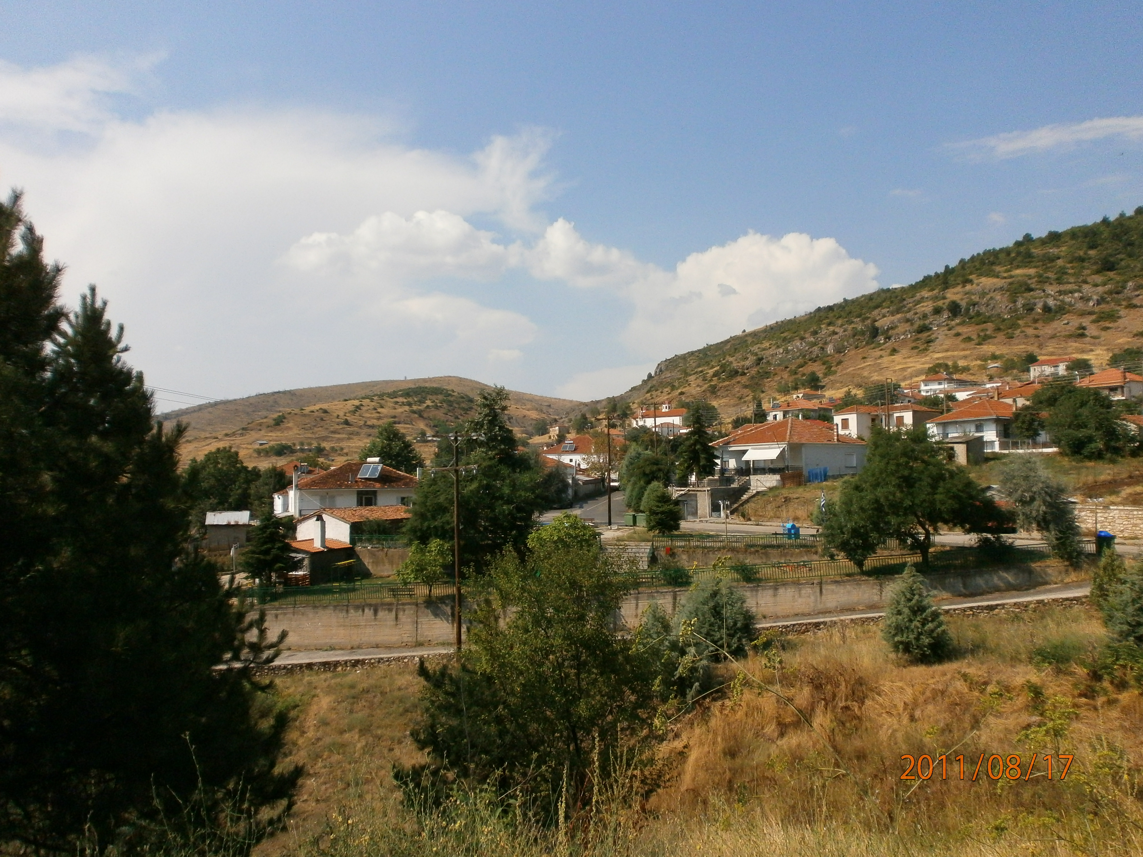 Селото днес